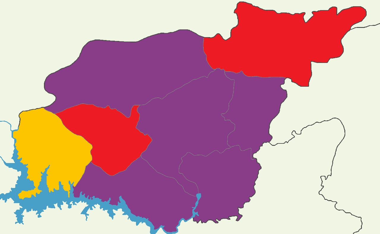 Tunceli'de 2014 Türkiye cumhurbaşkanlığı seçimi sonuçları